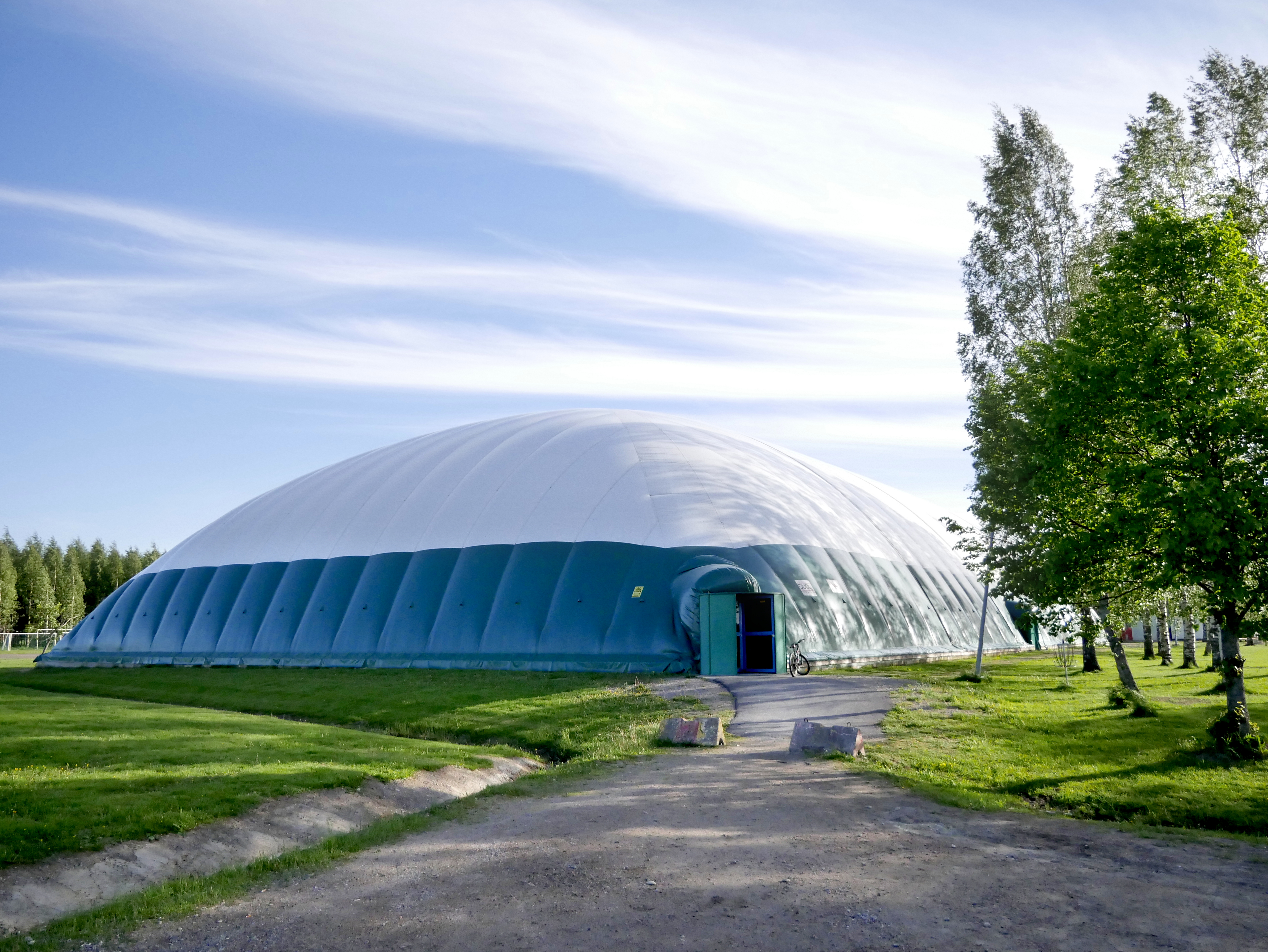 Nuotti Areena -kuplahalli Kauhajoella.